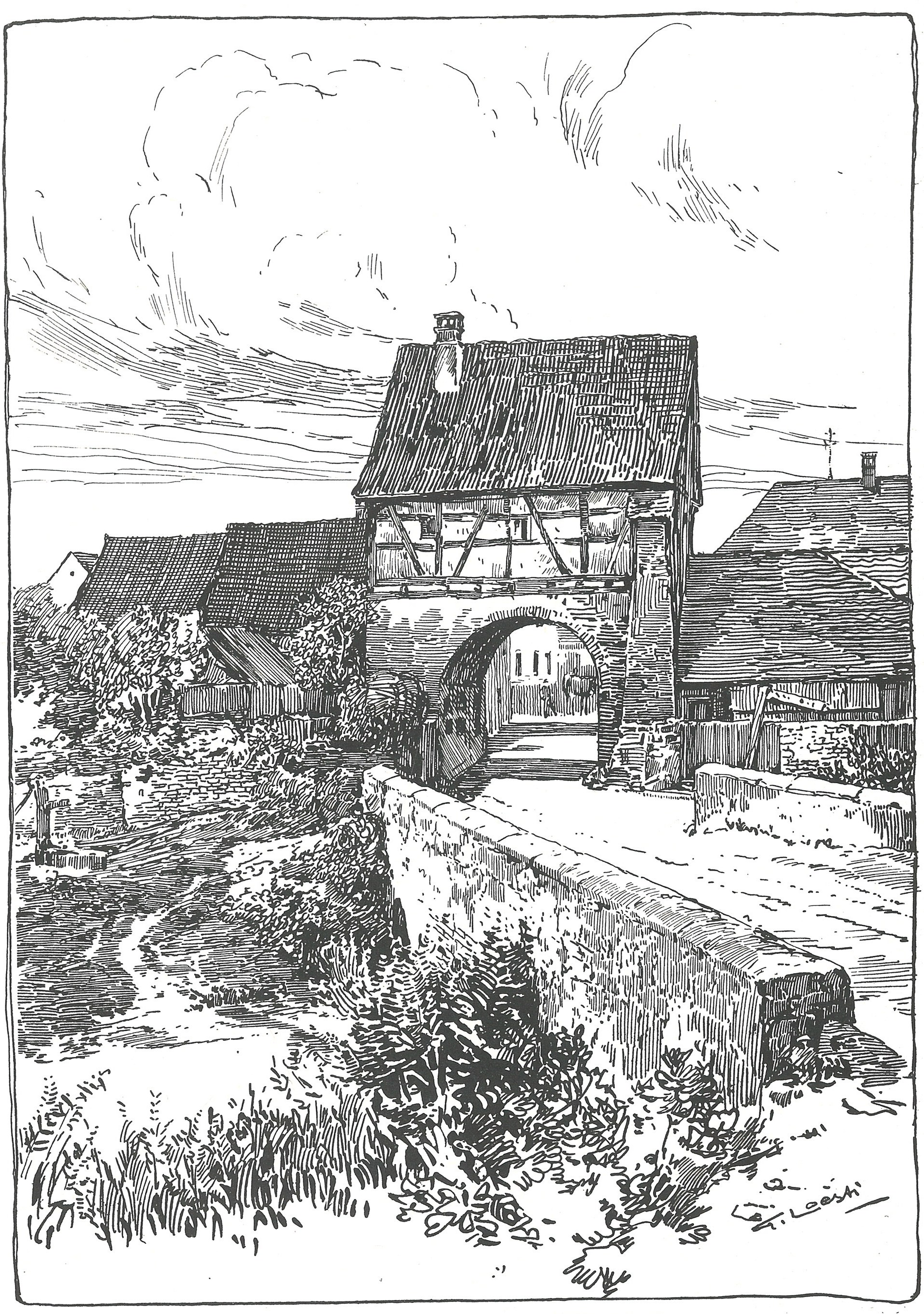 Karlinger, Hans: Kunstdenkmäler. S.179. Ehemaliges Torhaus der Ortsbefestigung von Obervolkach.